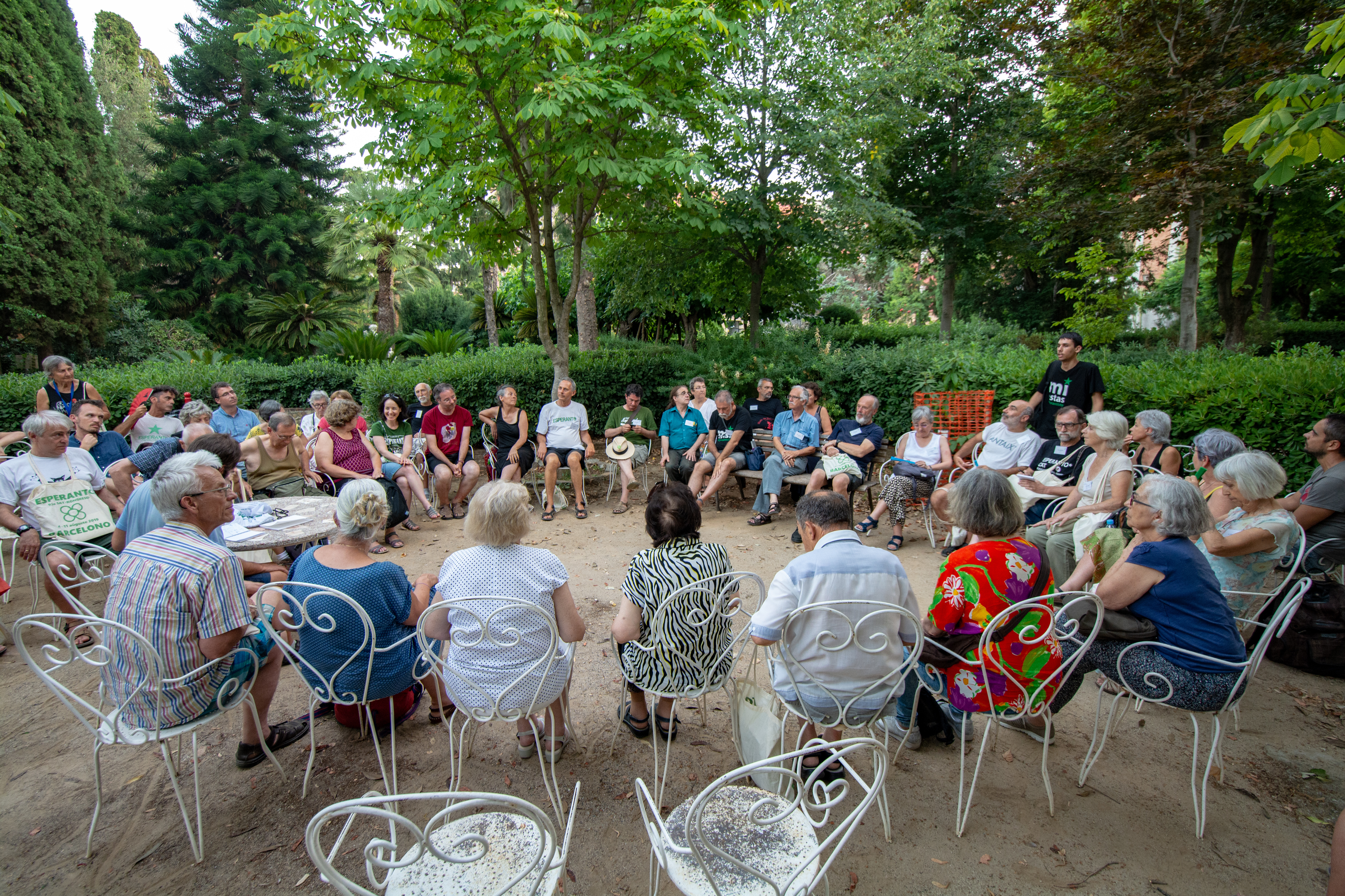 Diskuto pri la politika situacio en Katalunio dum la SAT-Kongreso 2019